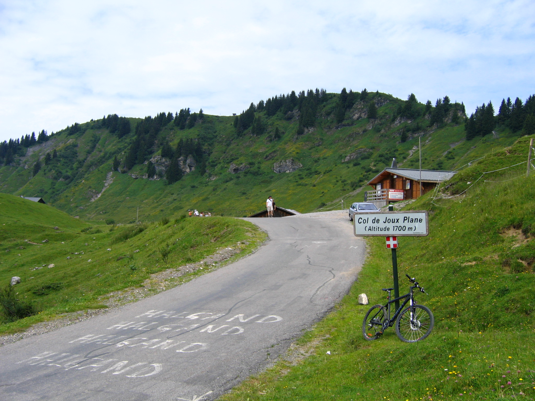 Col de Joux Plane